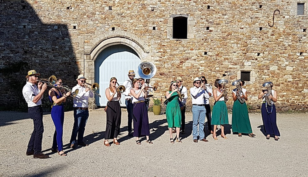 Fanfare Godfingers des Beaux-Arts de Versailles en 2017.